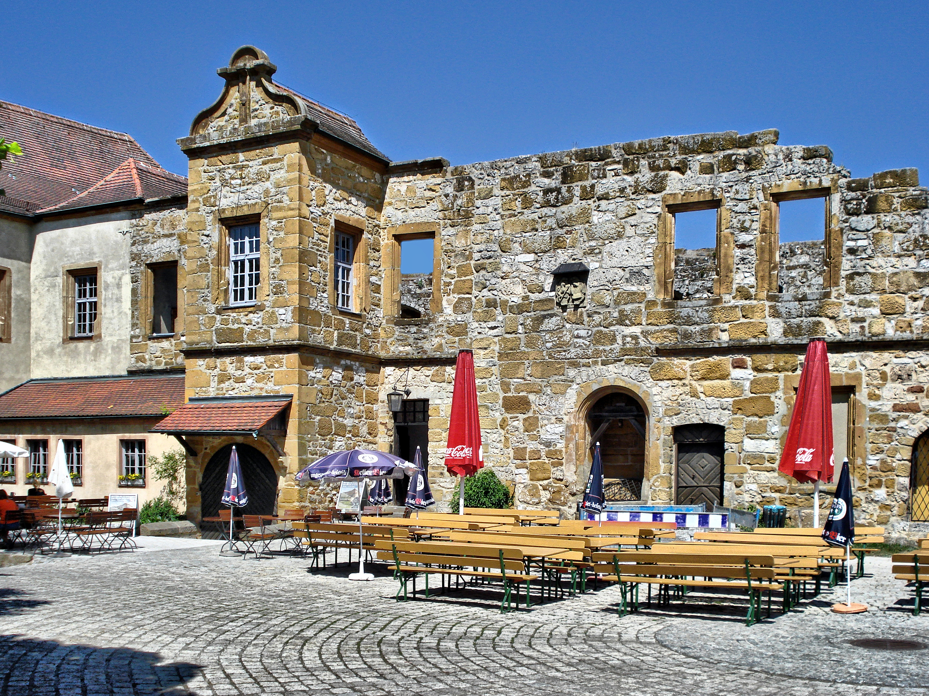 Innenhof der Giechburg bei Bamberg, Deutschland